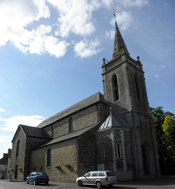 Église Saint-Jean-Baptiste d'Ercé-près-Liffré (35).